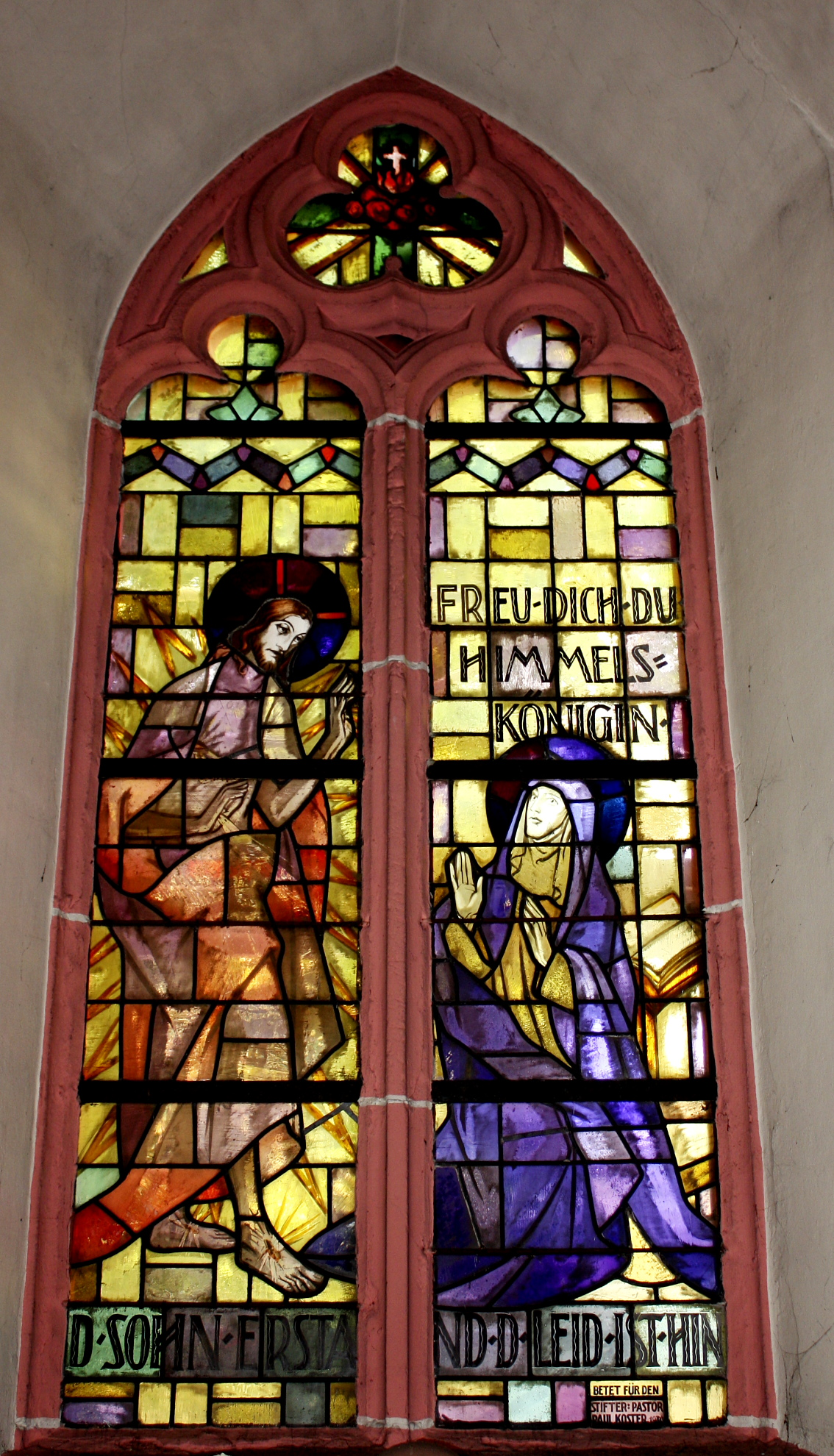 Fenster der ehemaligen Pfarrkirche Loesnich 2011.